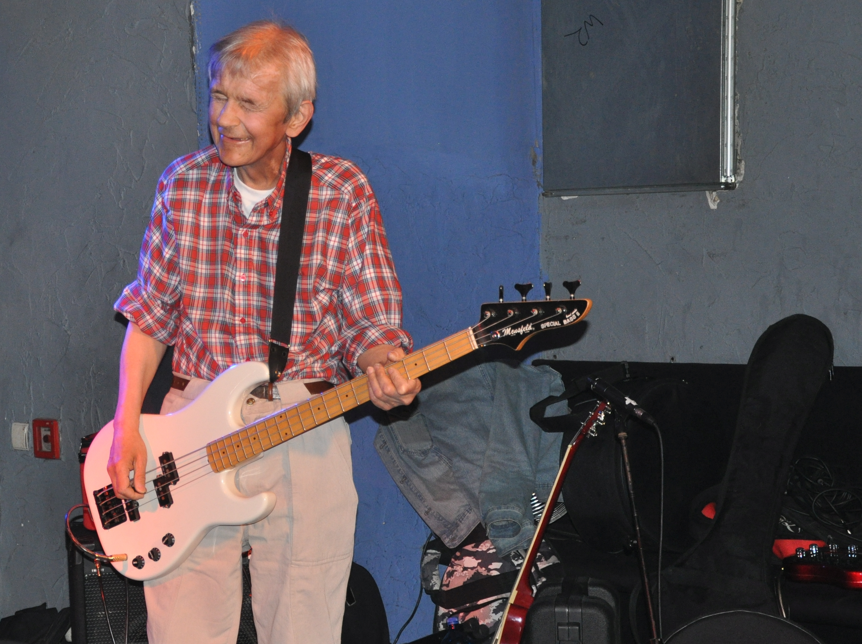 Ostatni koncert „Zwłok" ze „Skuterem" w klubie Łykend we Wrocławiu 25.05.2012 r.